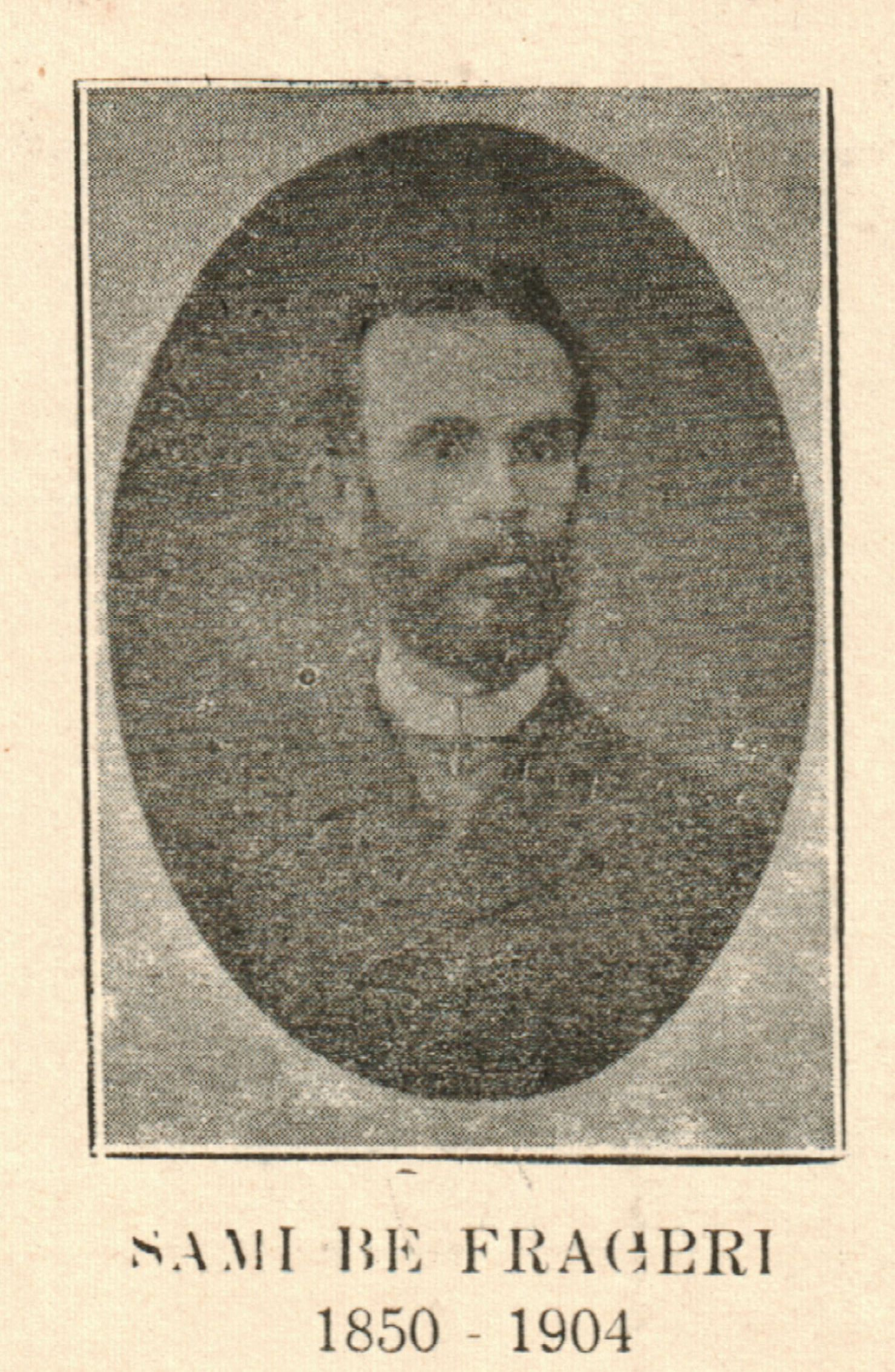 Снимка на Сами Фрашери.